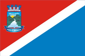 Bandeira do Município de Monteiro no estado da Paraíba, Brasil./ Flag of Paraíba's city Monteiro, Brazil